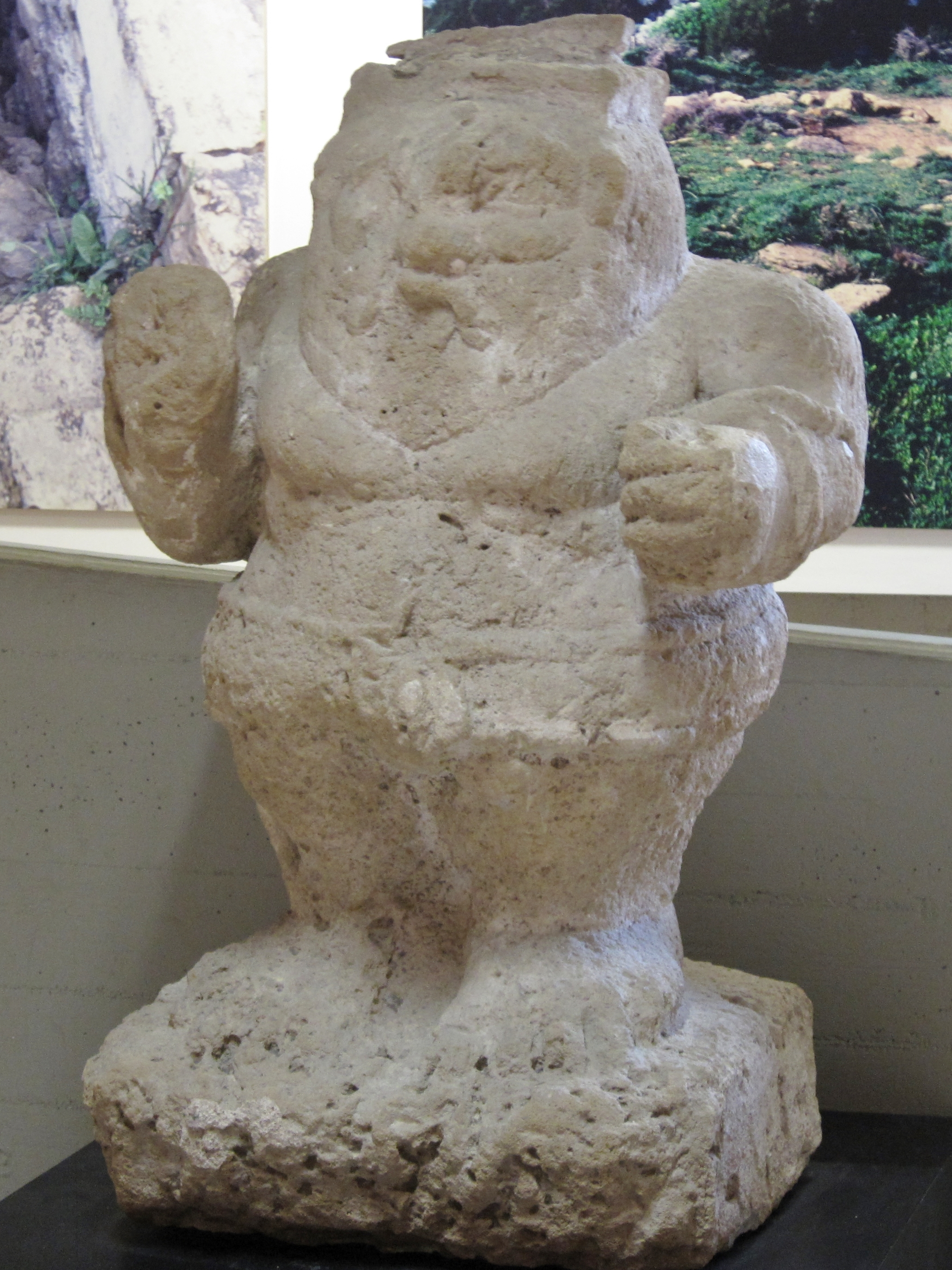 Statue des Bes aus dem Tempel von Bithia, Gemeinde Domus de Maria, Archäologisches Nationalmuseum Cagliari, Sardinien, Italien